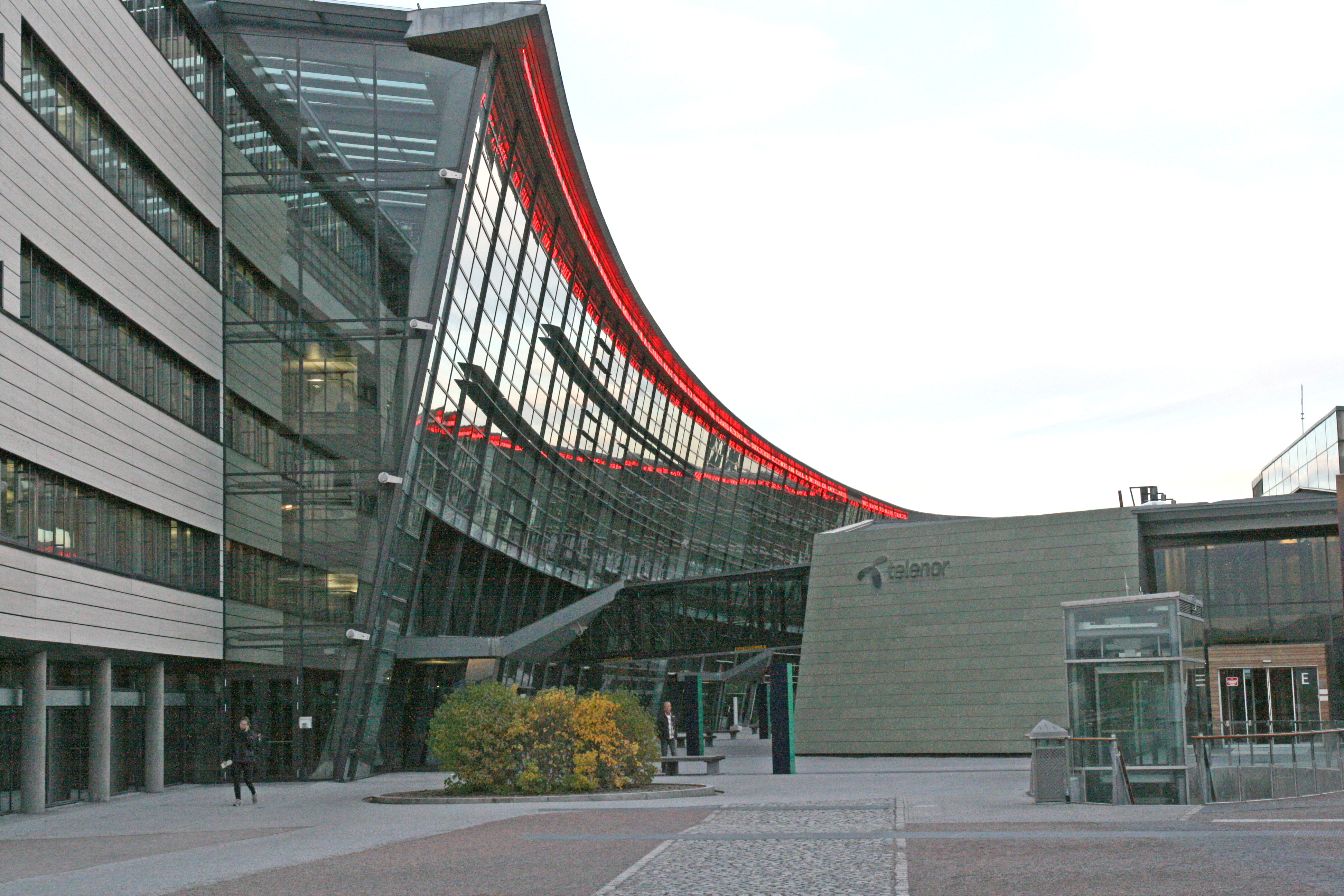 Telenors hovedkvarter på Fornebu